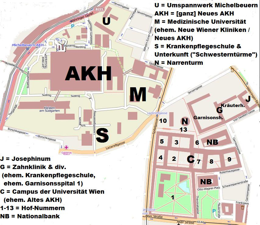 Übersicht über das Wiener Allgemeine Krankenhaus (AKH), das Alte Allgemeine Krankenhaus (AAKH) und jetziger Campus der Universität Wien